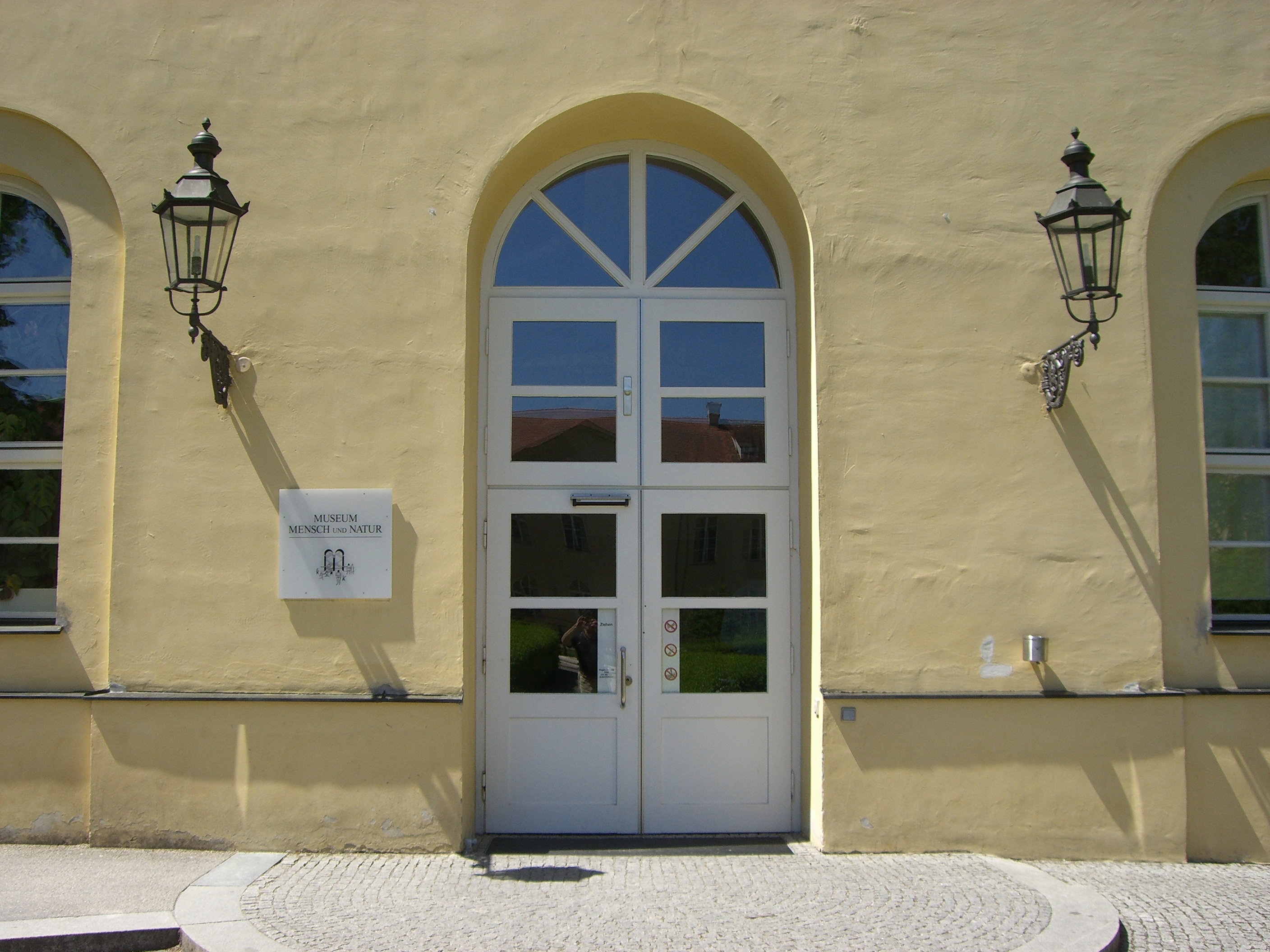 München - Museum Mensch und Natur (Eingang)